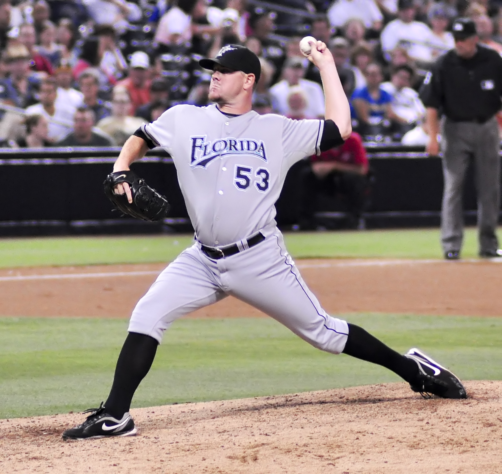 Dan Meyer